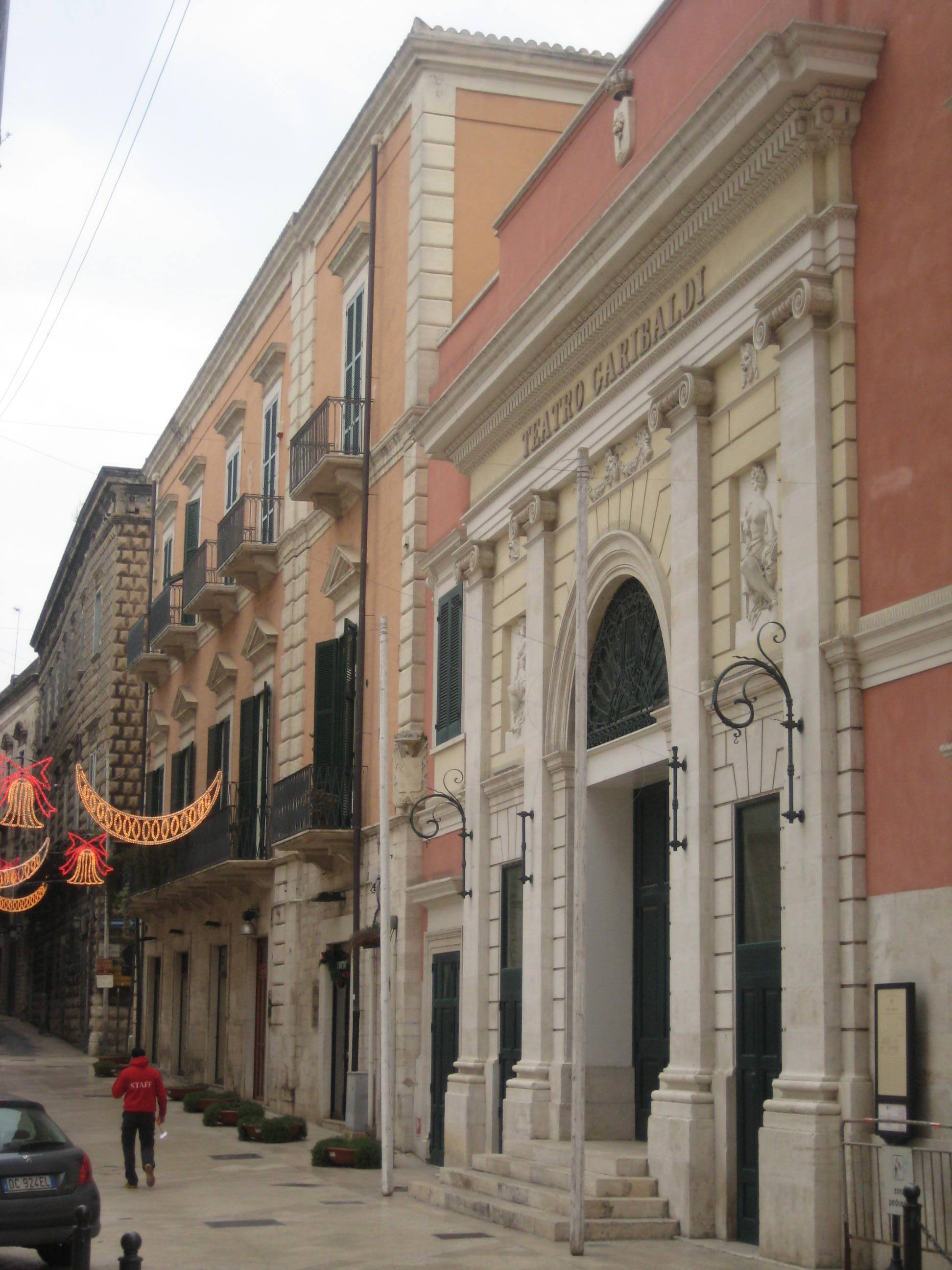 Bisceglie. Uno scorcio della facciata monumentale del Teatro "Garibaldi" edificato nel 1872 su progetto dell'architetto Giuseppe Albrizio.